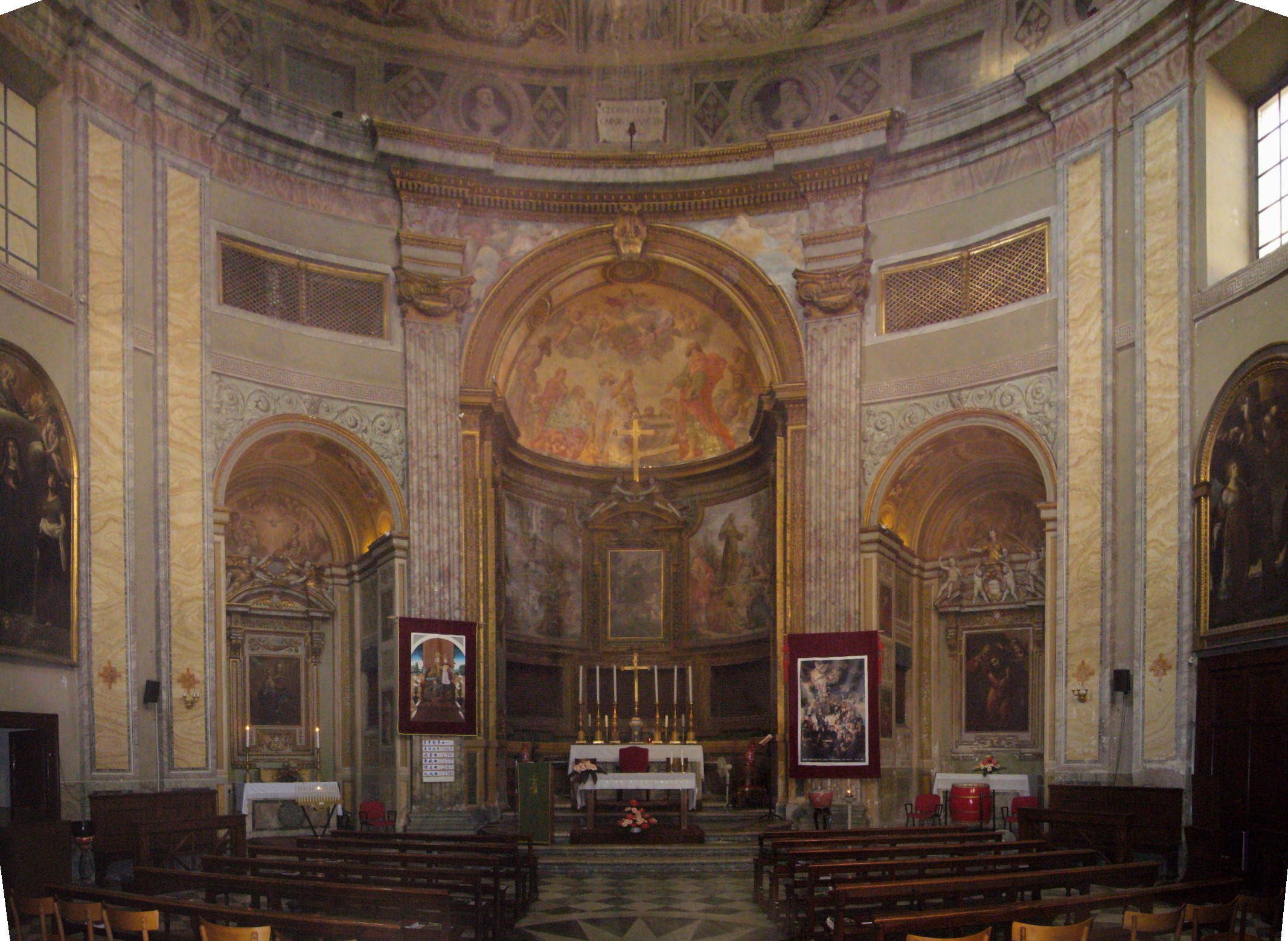 Roma, san Bernardino in Panisperna: interno a pianta ellittica